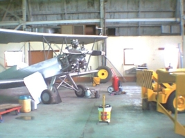 Curtiss E-16 KELITO en espera de restauración.